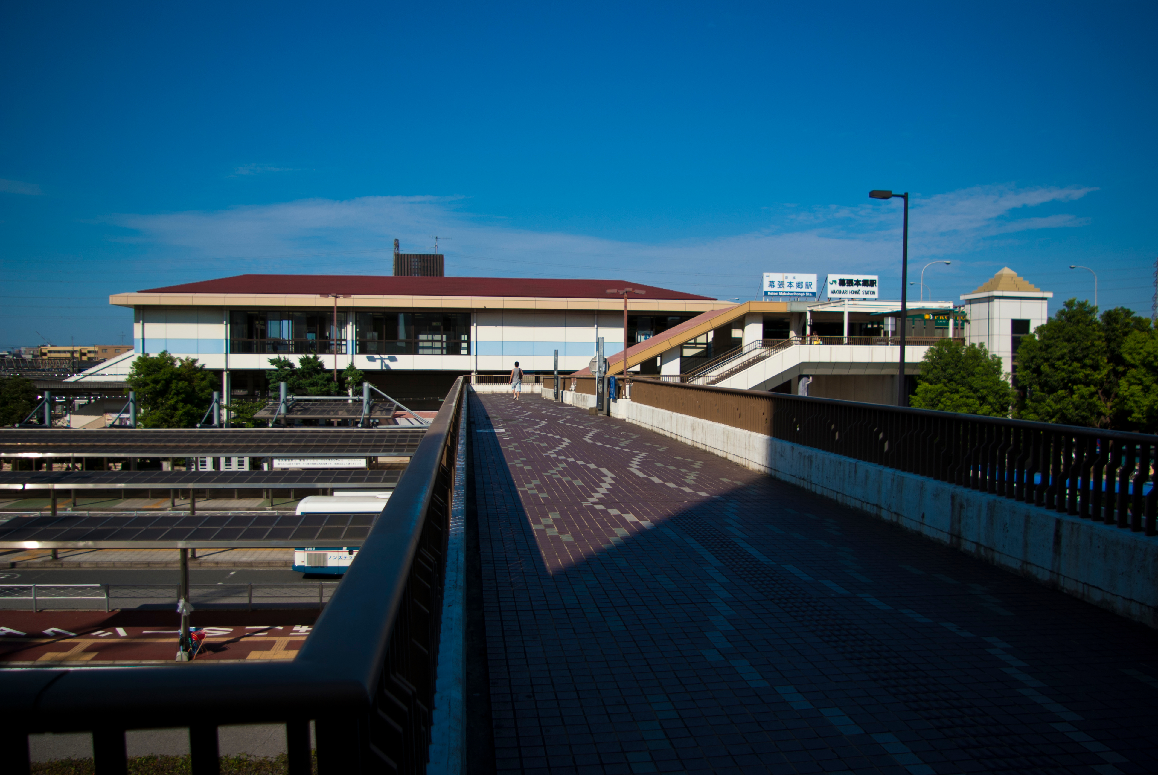 京成電鉄株式会社京成千葉線幕張本郷駅、東日本旅客鉄道株式会社総武本線幕張本郷駅